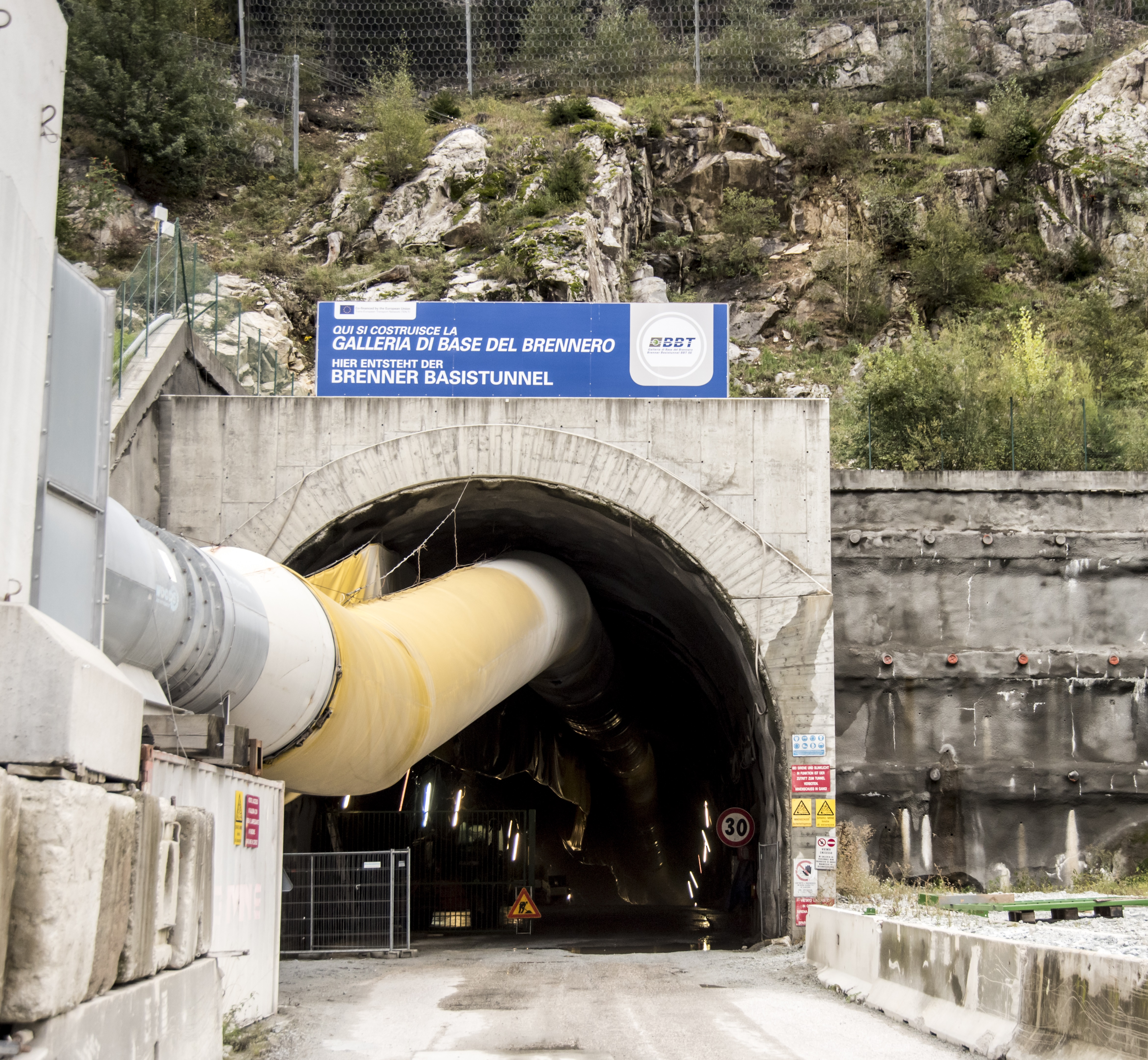 portale del lotto Mules 2-3